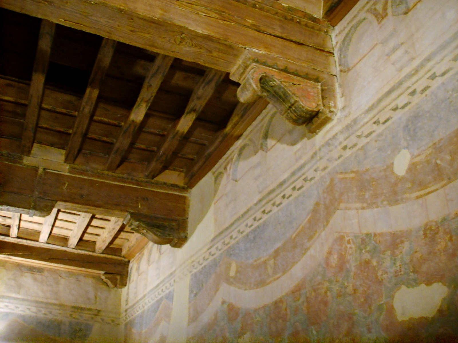 Palazzo gianni vegni, affreschi trecenteschi